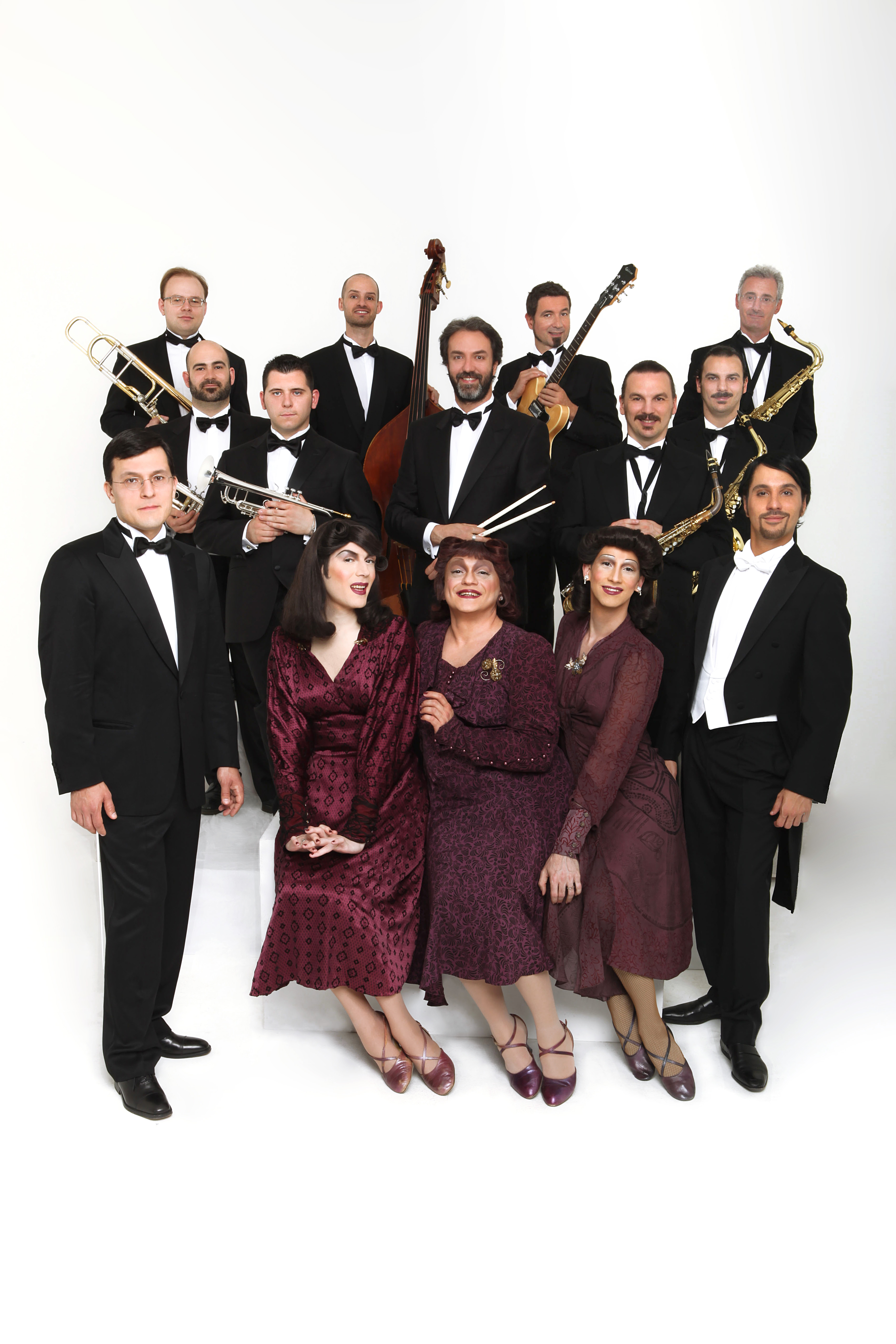 L'Orchestra Maniscalchi al completo con le Sorelle Marinetti